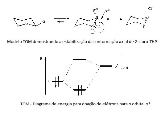 Demonstração de Efeito Anomérico conforme TOM